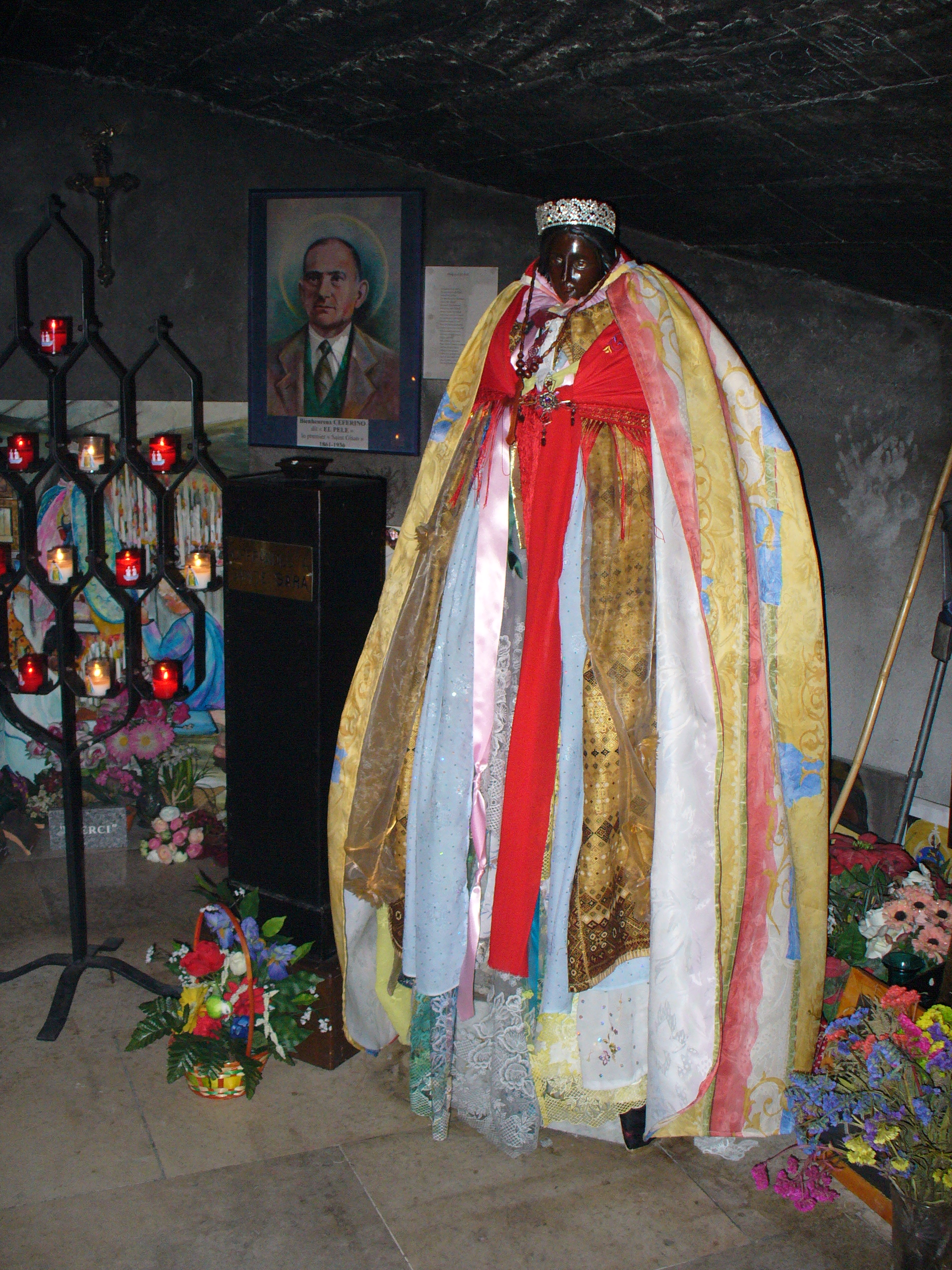 Die heilige Sarah in Stes.Maries-de-la-Mer